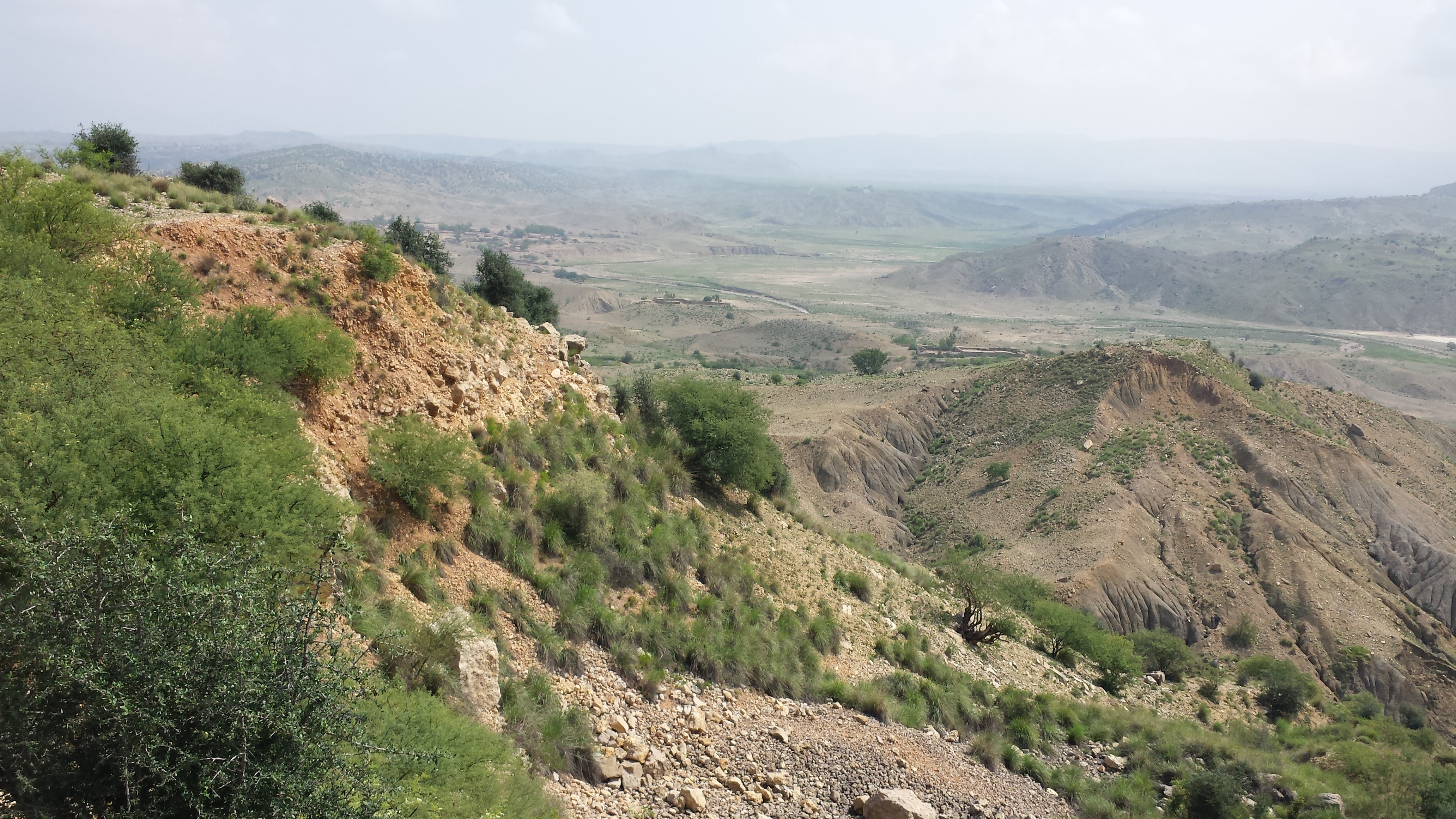 Navidhand Valley - Khyber Pakhtunkhwa - Pakistan